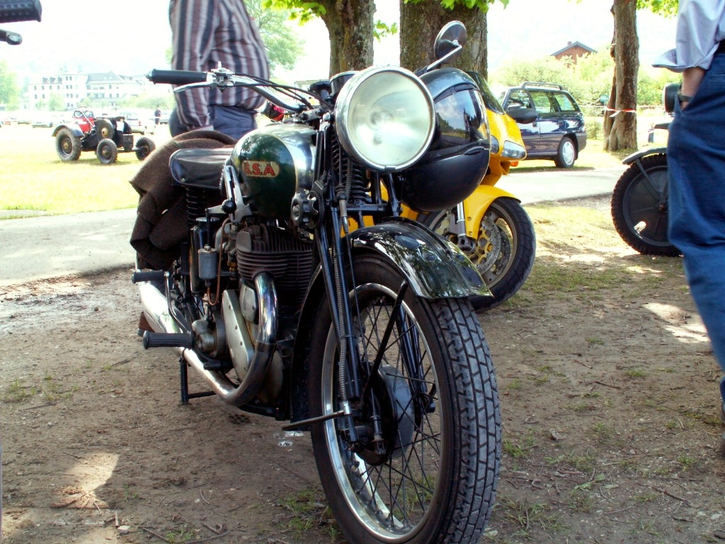 B.S.A. aus den 1930er Jahren. B.S.A M 20 (1937-55).